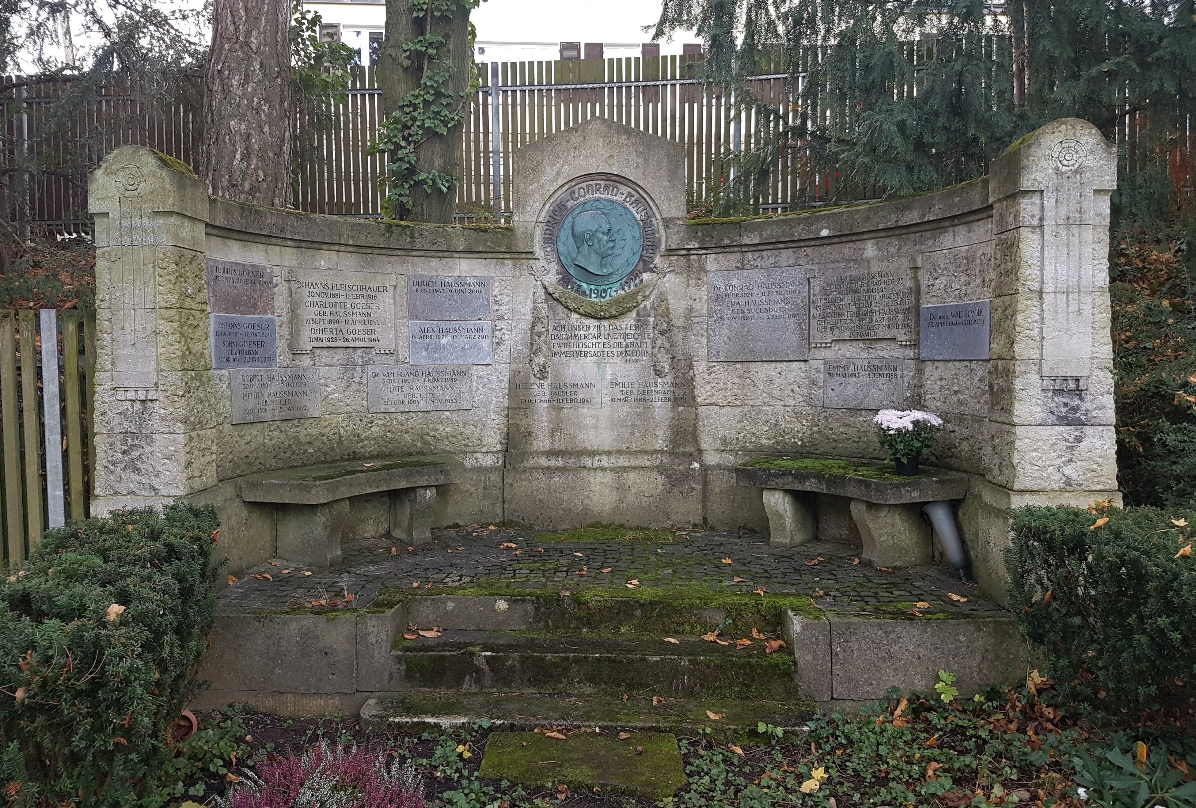 Familiengrabstätte Haussmann auf dem Friedhof Heslach in Stuttgart